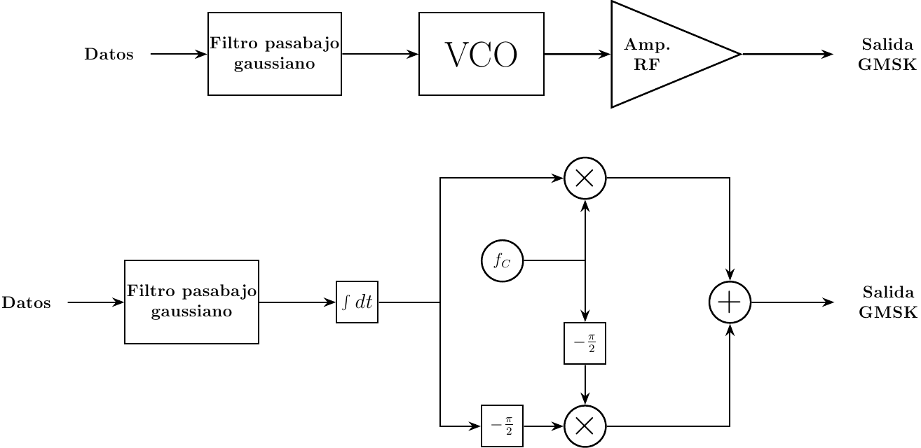 Dos tipos diferentes de moduladores para GSMK (modulación por desplazamiento mínimo Gaussiano).